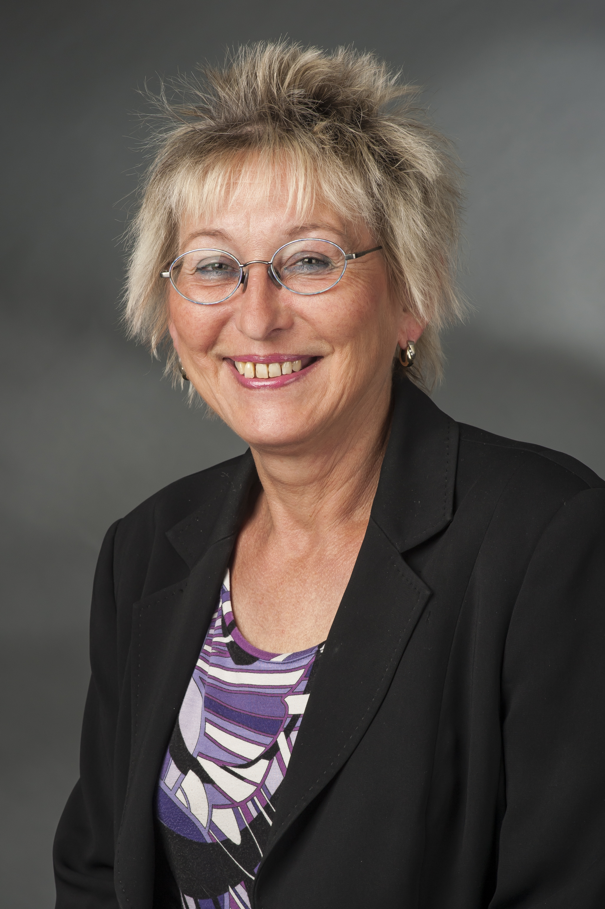 Porträt von Eva Bulling-Schröter (Die Linke)